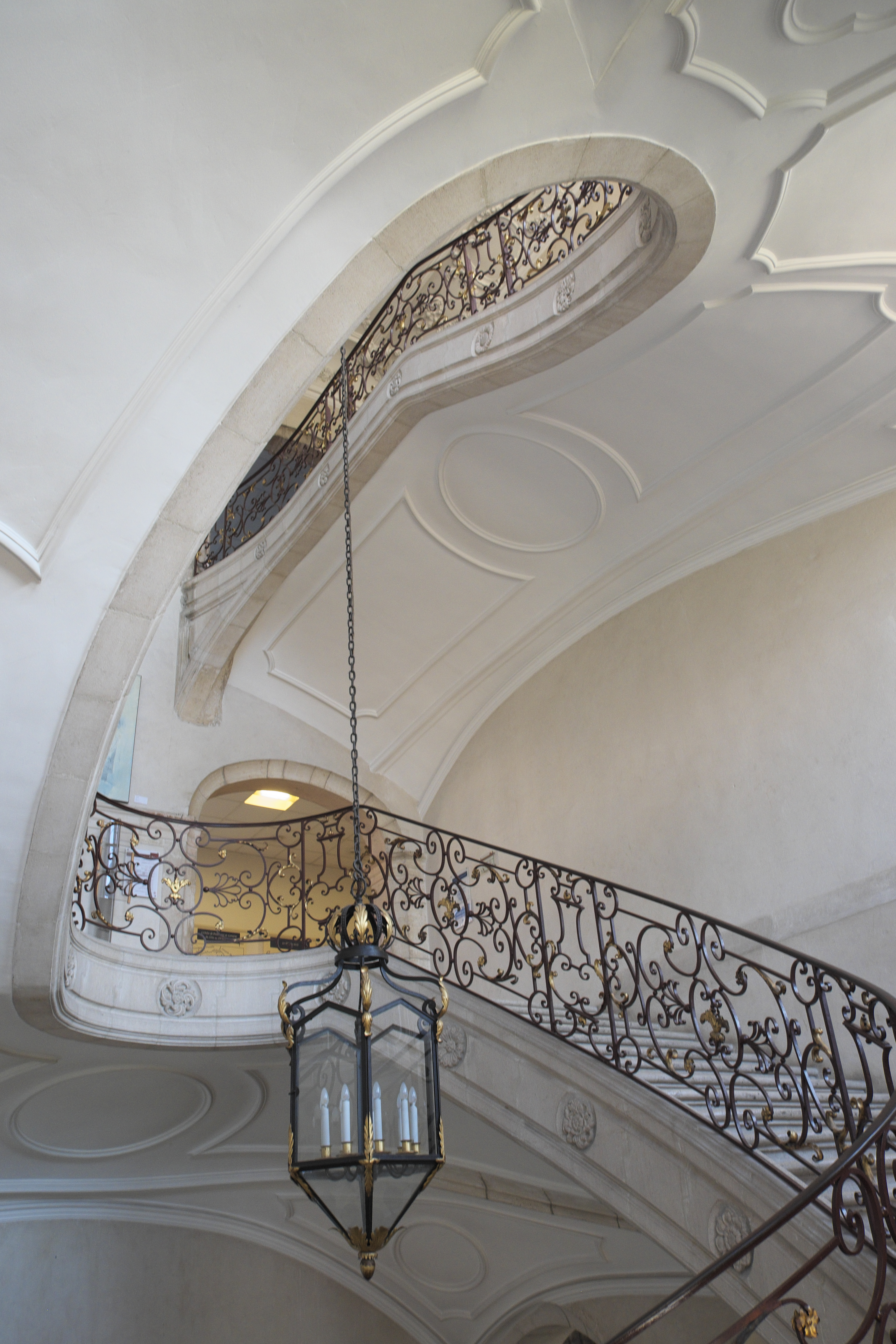 Ehemalige Prämonstratenserabtei in Pont-à-Mousson im Département Meurthe-et-Moselle (Region Grand Est/Frankreich), ovales Treppenhaus